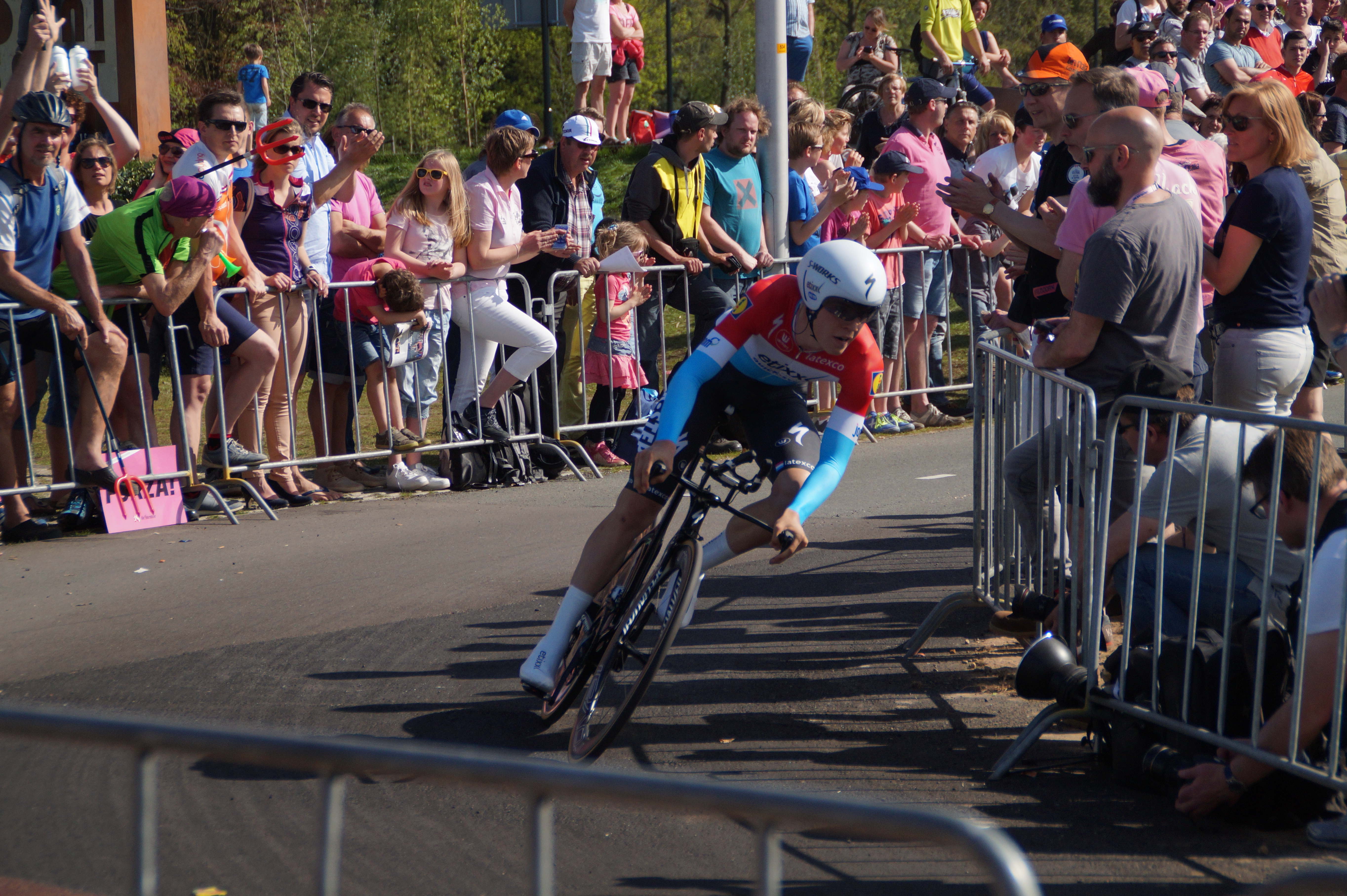 DSC04957 Bob Jungels